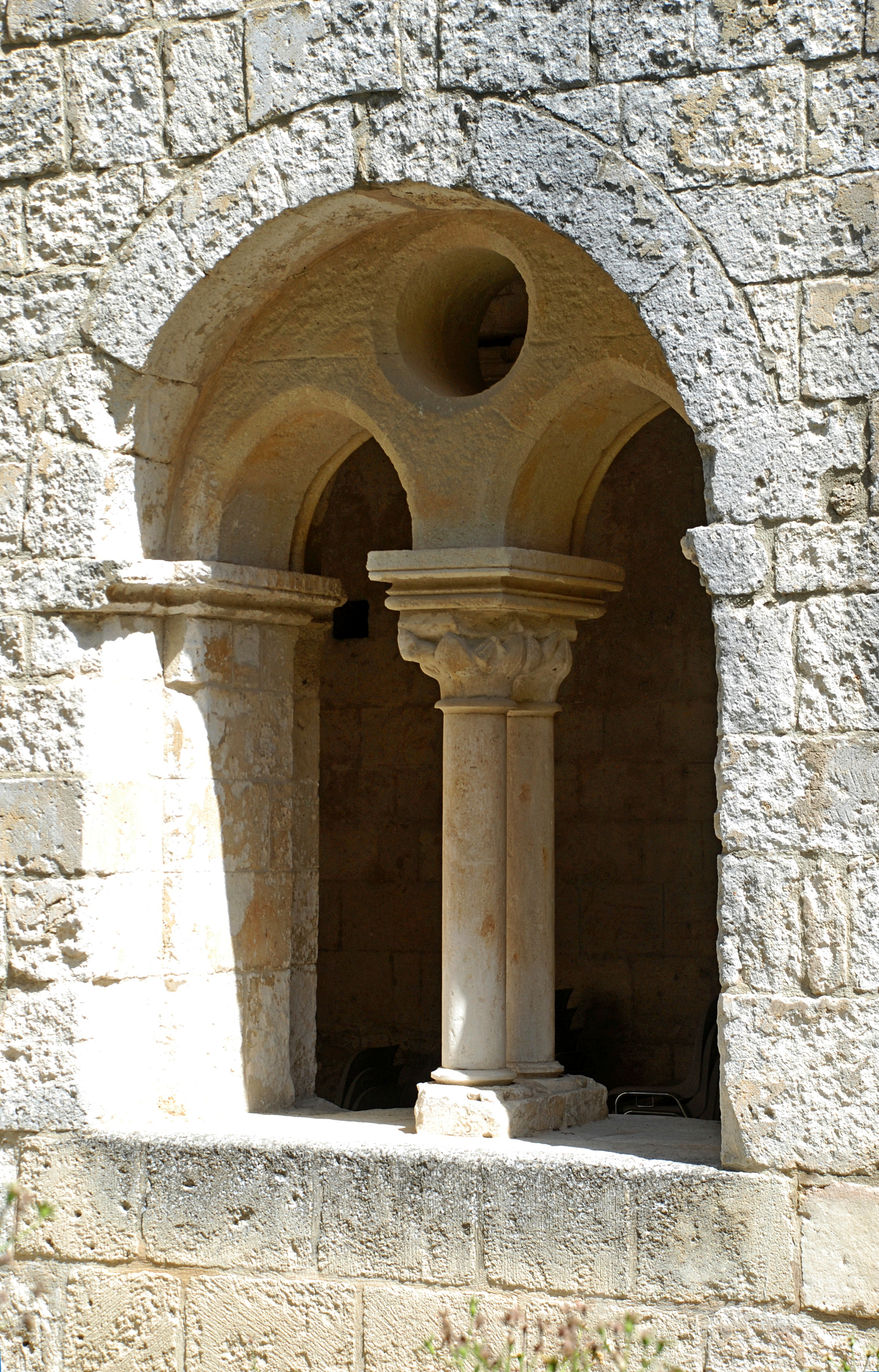 France - Provence - Abbaye de Silvacane